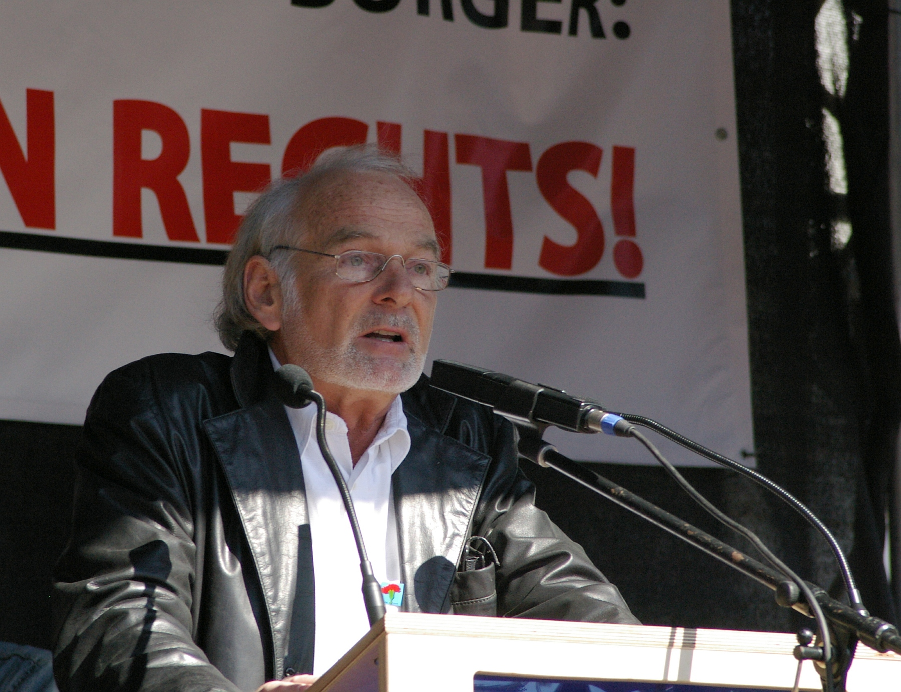 Claus Dieter Clausnitzer bei der DGB-Maikundgebung 2007 auf dem Platz der ehemaligen Synagoge in Dortmund, Nordrhein-Westfalen, Deutschland.